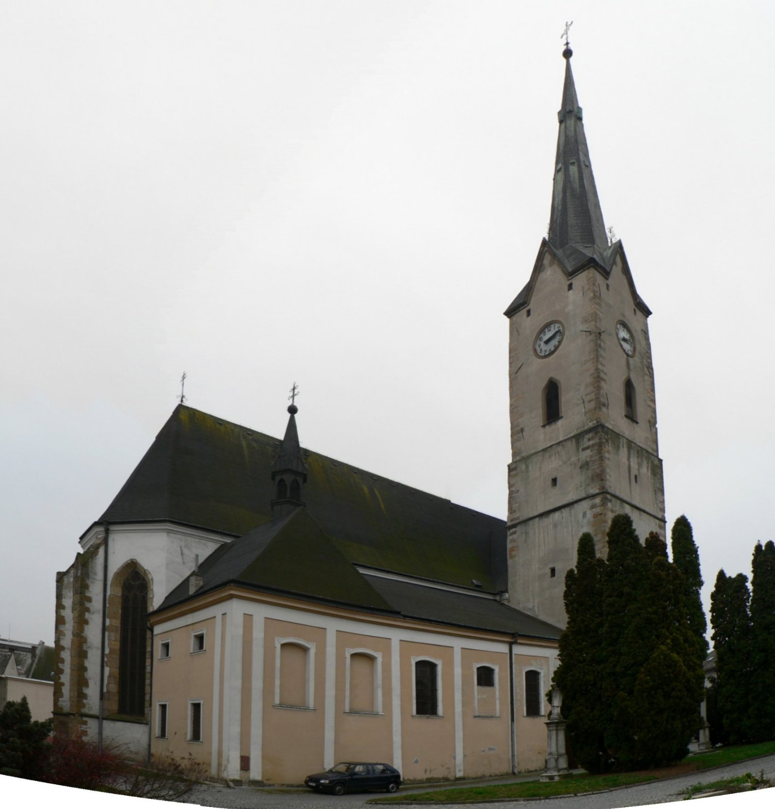 Kostel svatého Tomáše z Canterbury (Mohelnice)